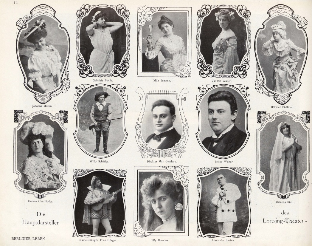 Die Hauptdarsteller des Berliner Lortzing-Theaters (vorher Belle-Alliance-Theater genannt) im Jahr 1906.